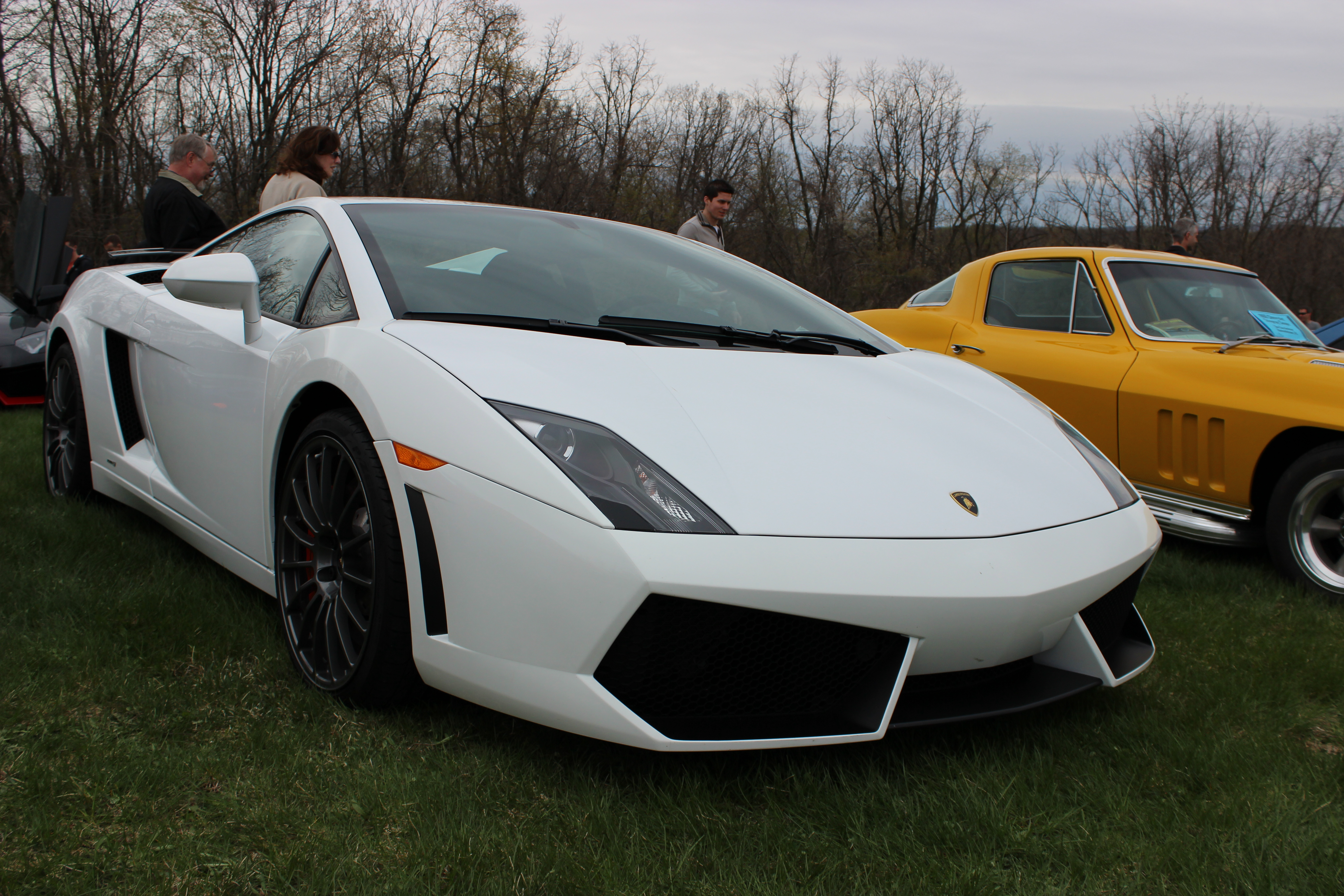 Lamborghini Gallardo LP560-4